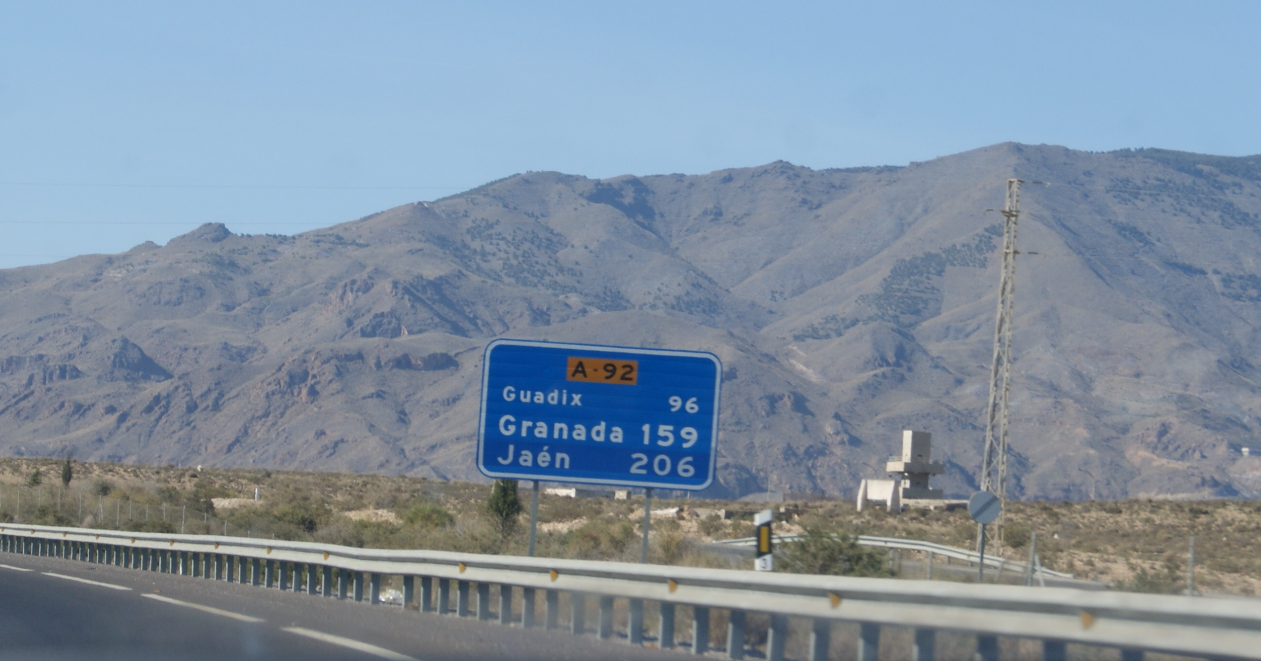 Panel informativo al comienzo por Almería de la A-92